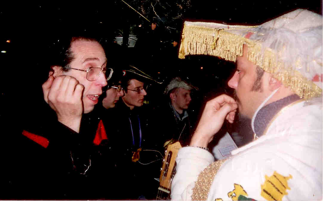 Le soir du Carnaval de Paris 2005, dans un café du Quartier latin, carrefour de l'Odéon, Basile Pachkoff en conversation avec Raffaelle Colavecchi dit en Goliardia SS Astrolabius Johannes VIII Sucellus XLVI Pontifex Maximus Goliardorum, Grand Pontife de l'Ordre souverain de la Goliardia de Turin, la S.O.T.C.A.P. : Supremus Ordo Taurini Cornus atque Pedemontanus - S.O.T.C.A.P. (Ordre Suprême du Taureau Cornu et Piémontais).